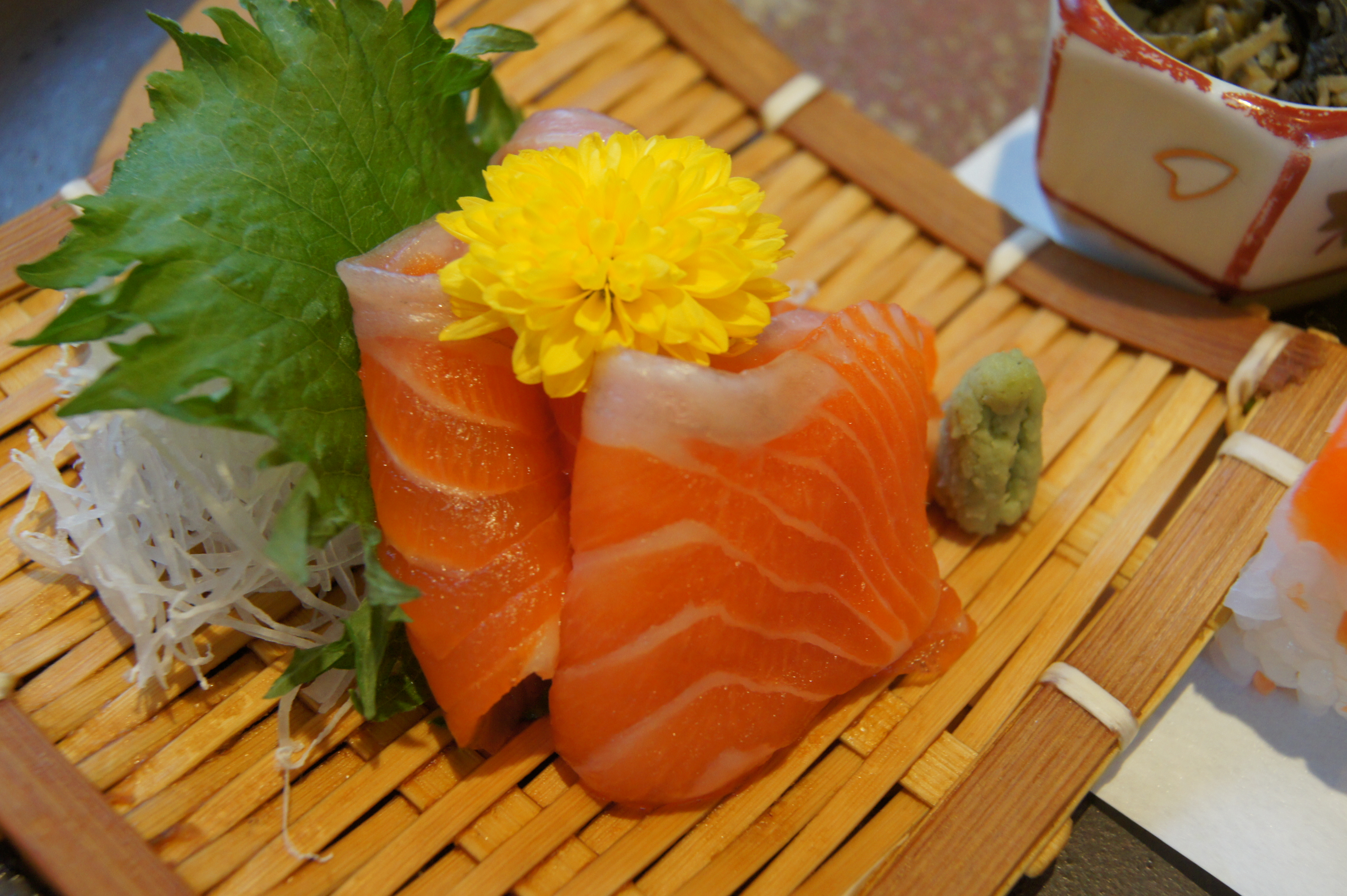 料理・・・信州サーモン